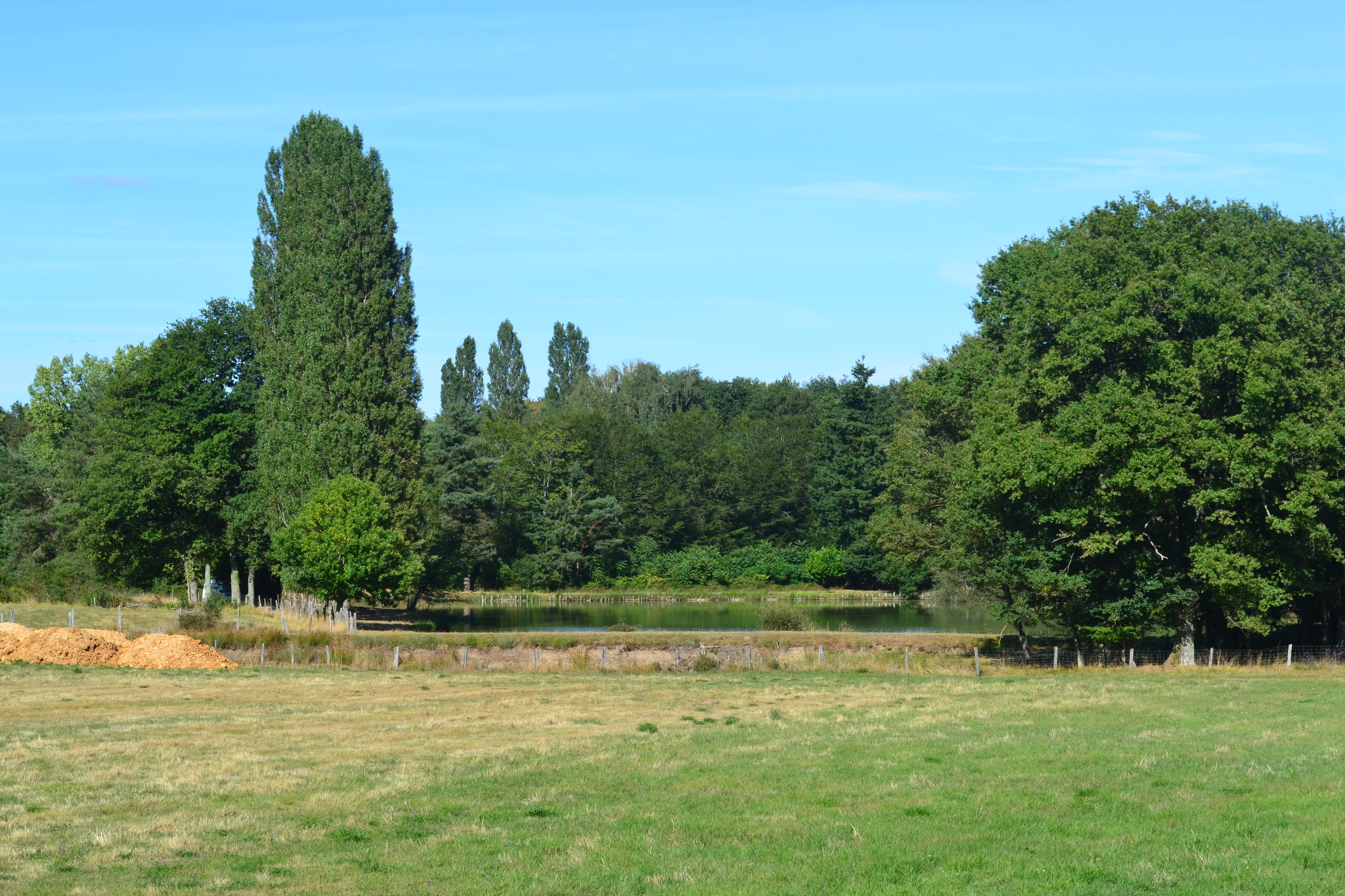 L'étang dans lequel la judelle prend sa source